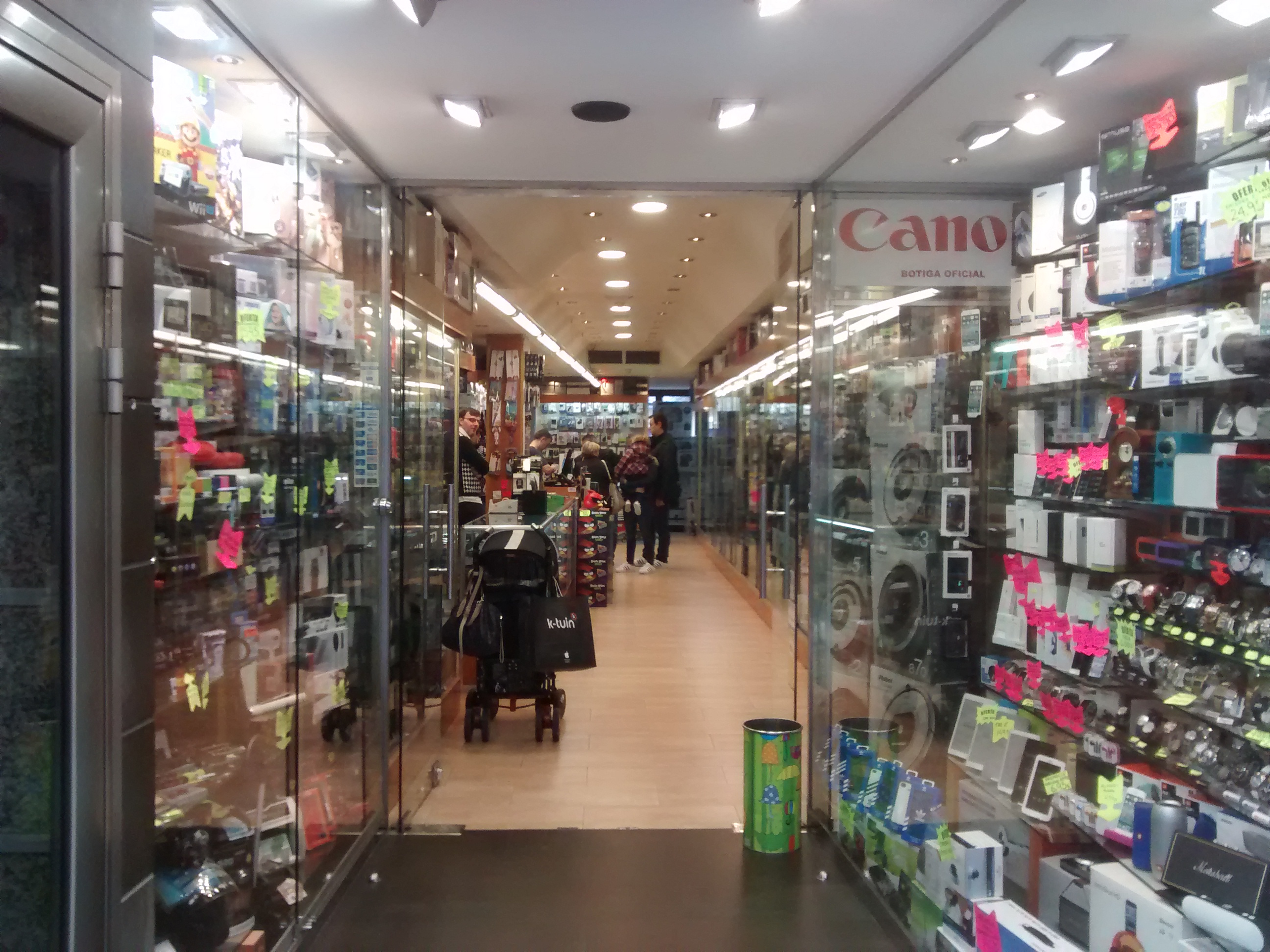 Electronics for sale in Andorra la Vella